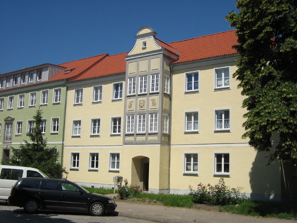 Friedländer Straße 19 in Neubrandenburg